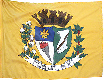 Bandeira do município de Bilac.